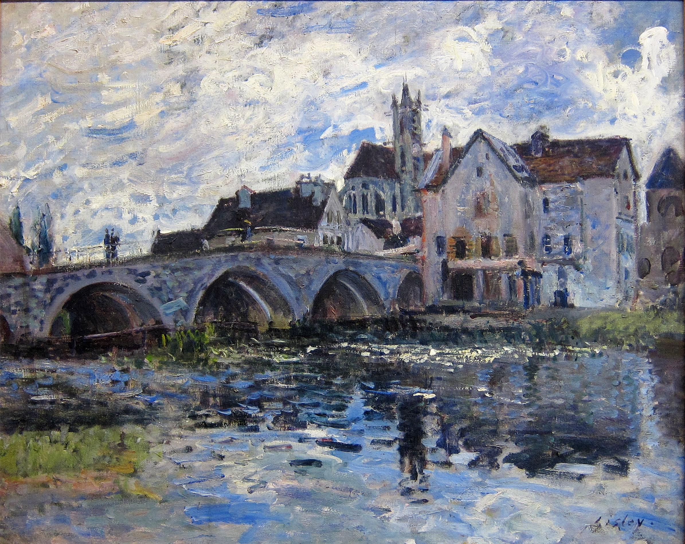 Le pont de Moret, effet d'orage au musée des Beaux-Arts André Malraux du Havre.